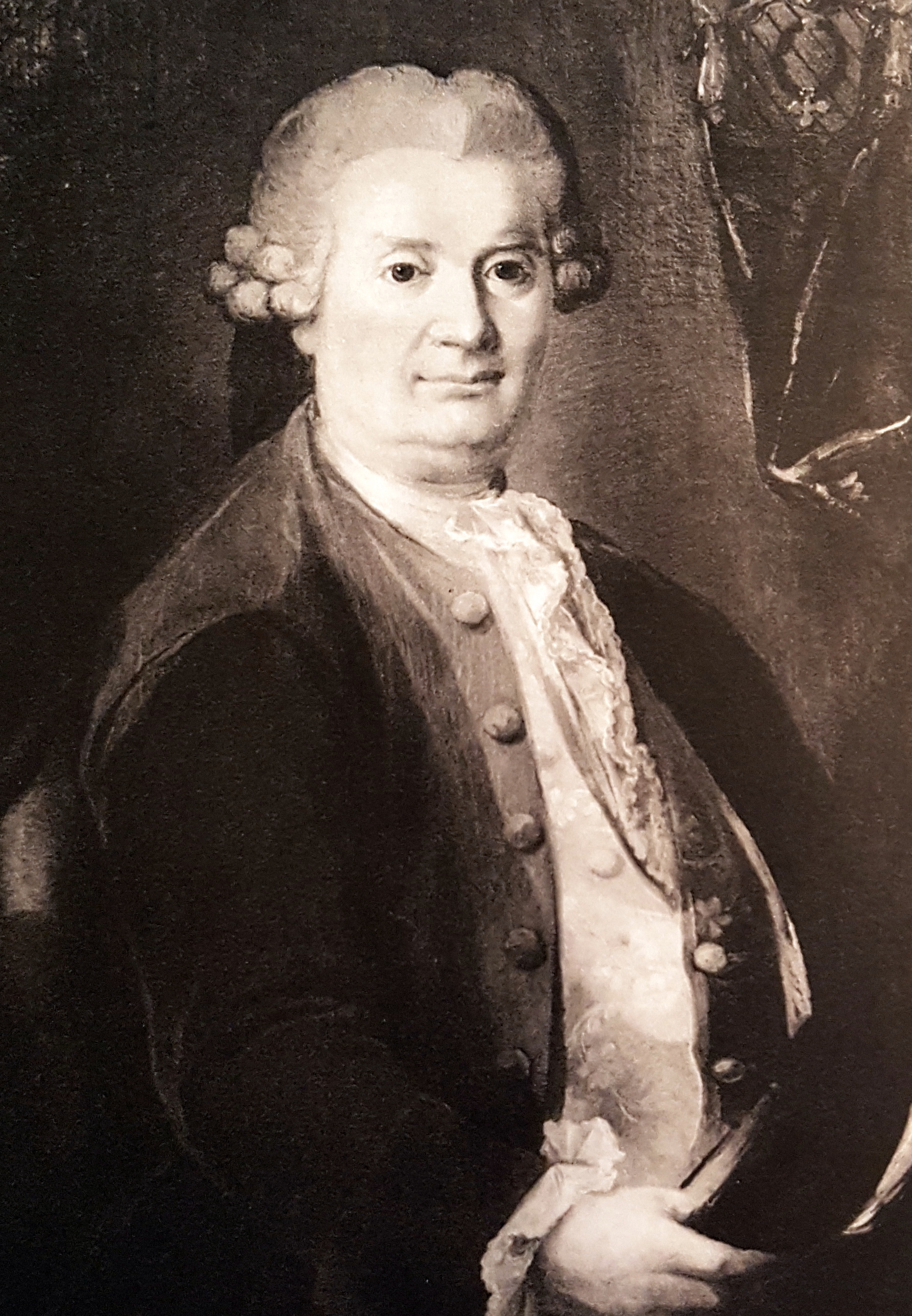 Carl Adlerwald, oljemålning av A J Cellberg